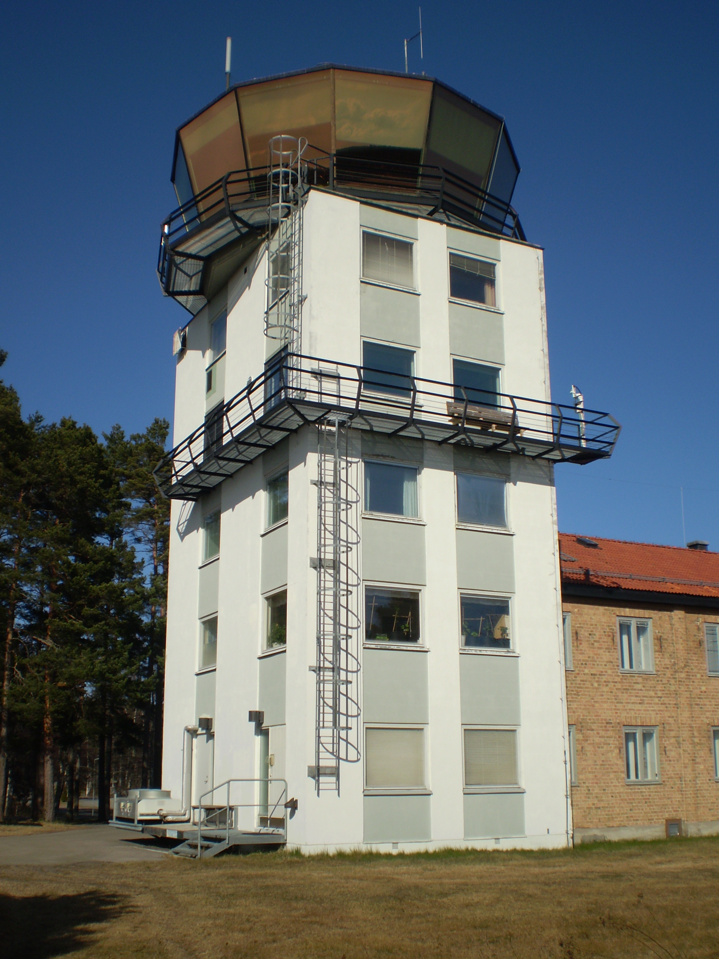 Kontrolltornet vid F 15 Söderhamn/Helsinge Airport